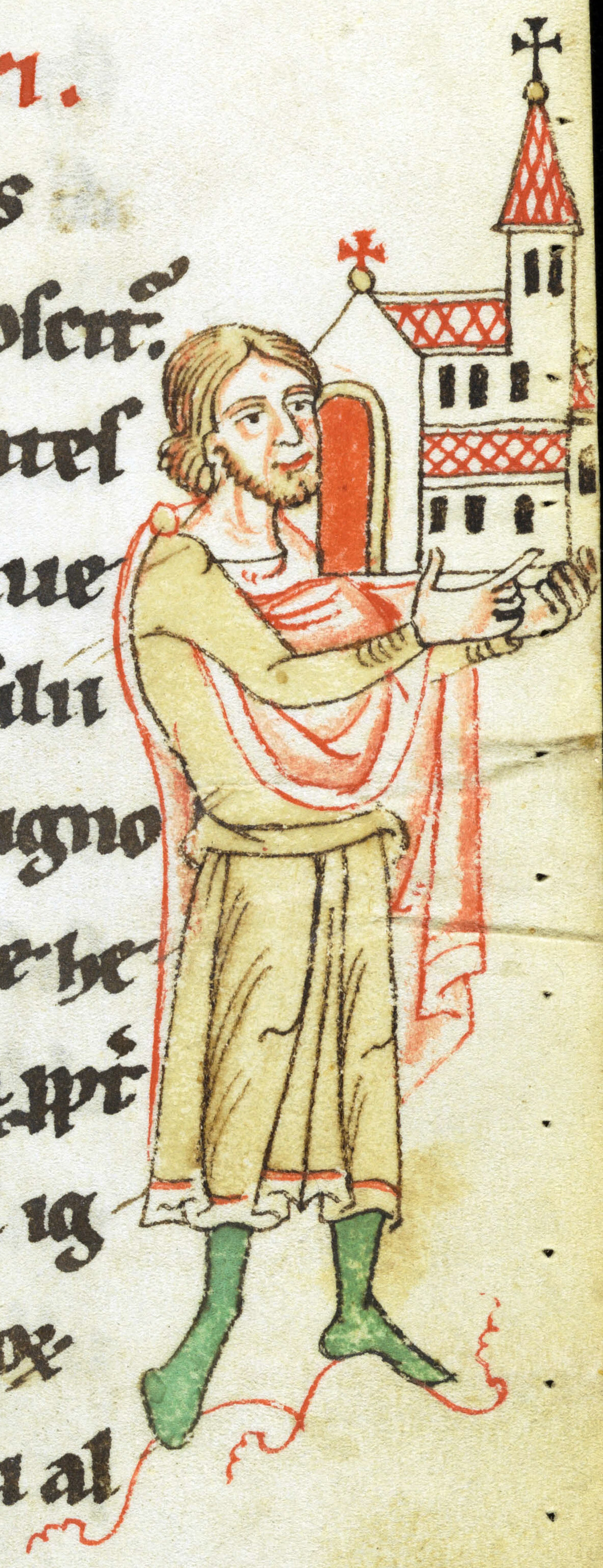 Acta Sancti Petri in Augia; St. Gallen, Kantonsbibliothek, Vadianische Sammlung, VadSlg Ms. 321, S. 5, Ritter Gebizo übergibt das Kloster